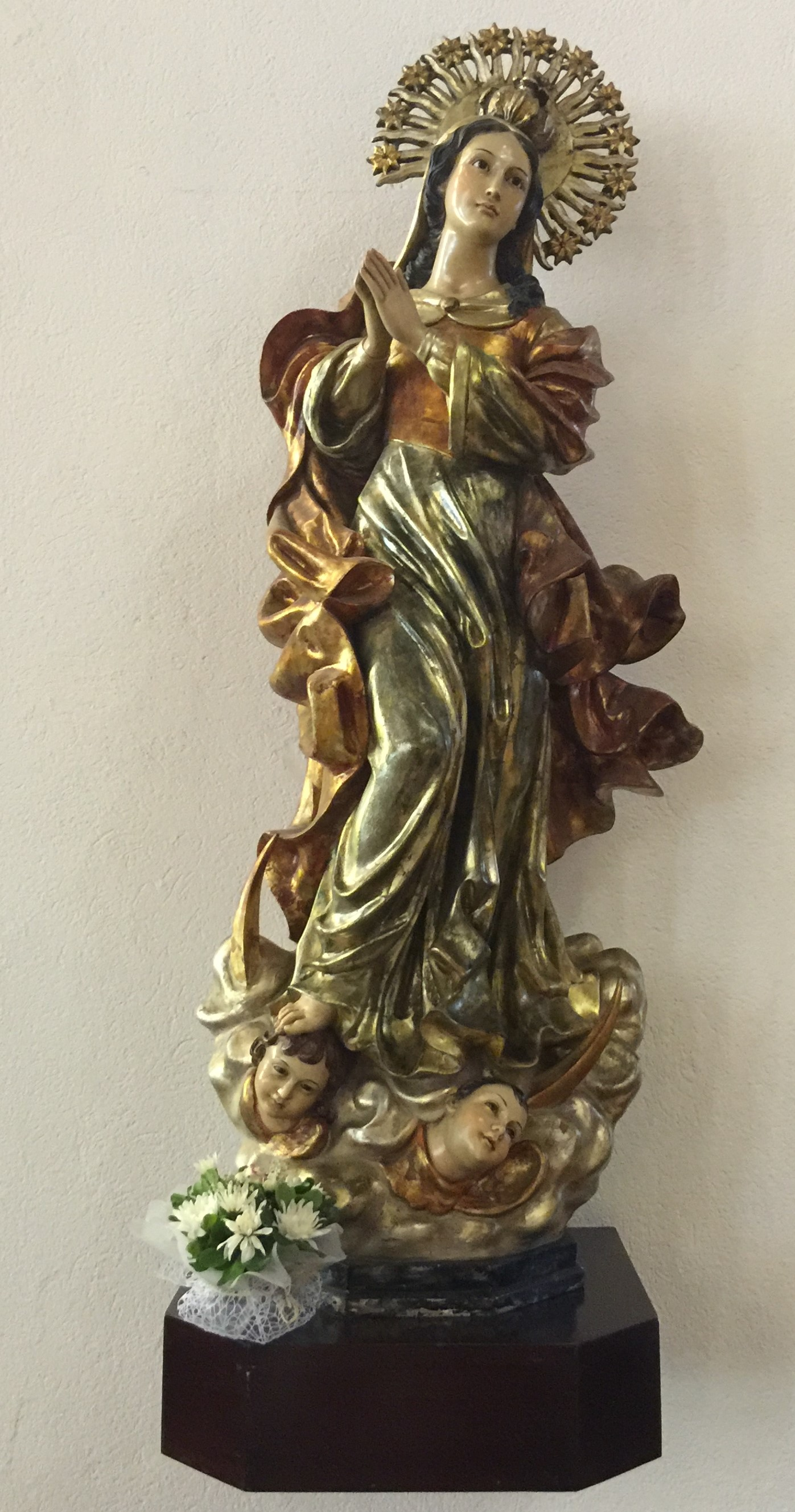 Escultura de Virgen María de Peter Horn Werner, nació en Munich, Alemania, el 8 de abril de 1908 y falleció en Santiago de Chile, el 11 de abril de 1969. Fue un connotado escultor religioso alemán - chileno. Esta escultura se encuentra en la Parroquia ee Santa Elena , comuna de Las Condes, Santiago de Chile